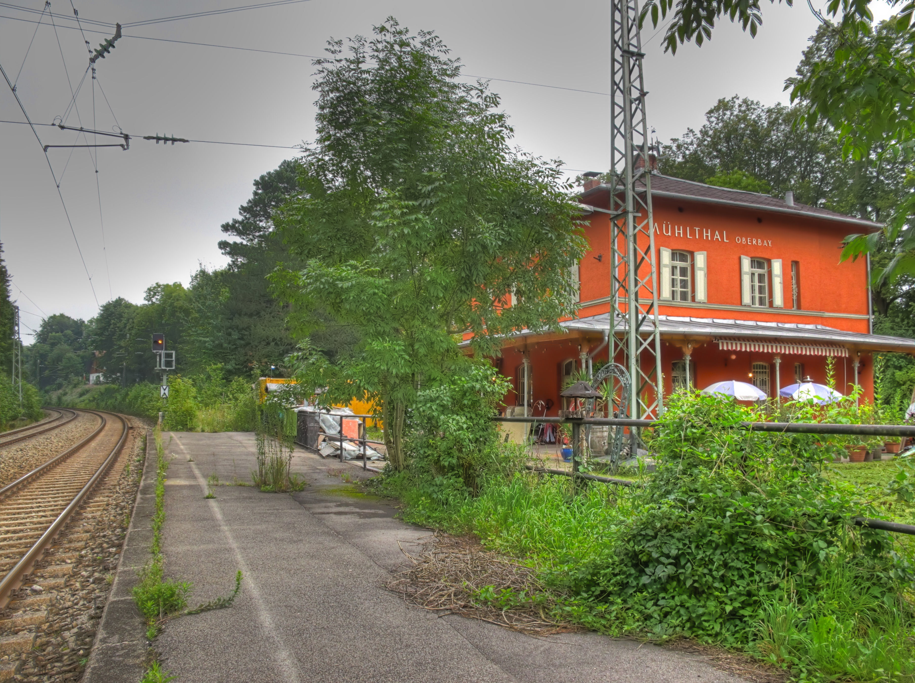 Aufgelassene S-Bahnstation im Mühlthal